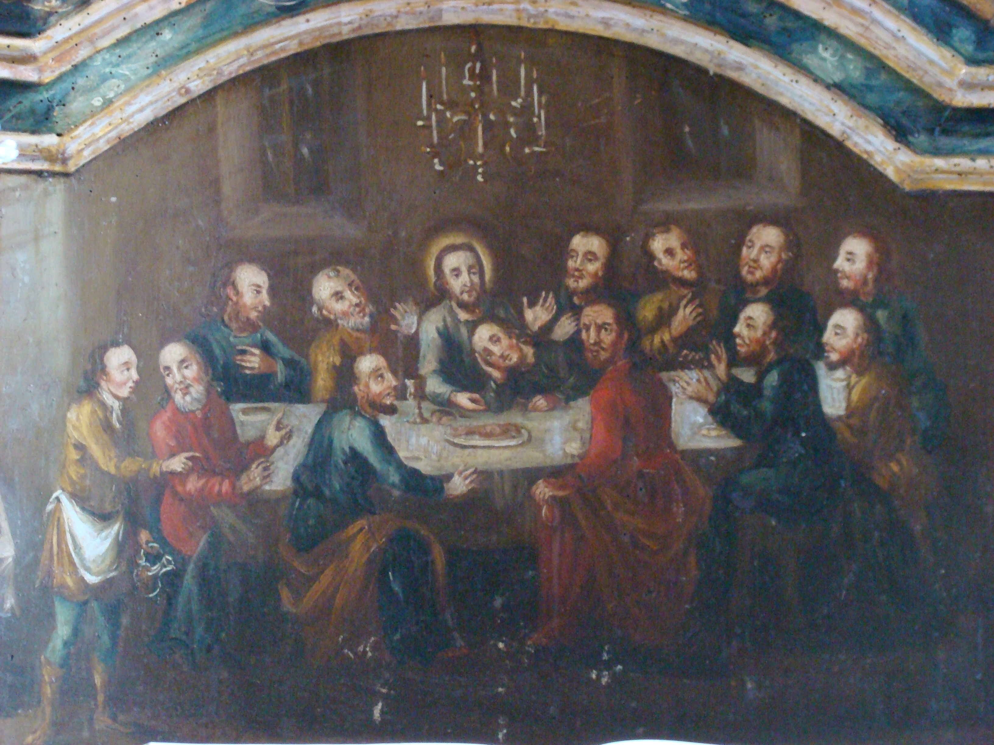 Biserica evanghelică, oraș Miercurea Sibiului, județul Sibiu 01